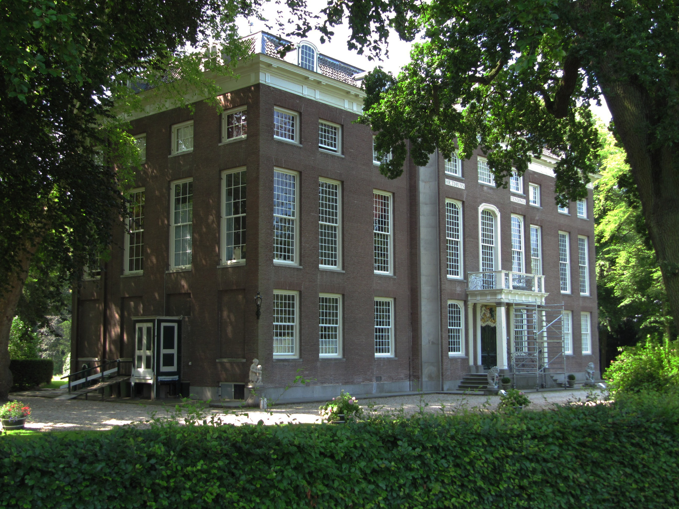 Ridderkerk - Benedenrijweg 461.jpg, rijksmonument